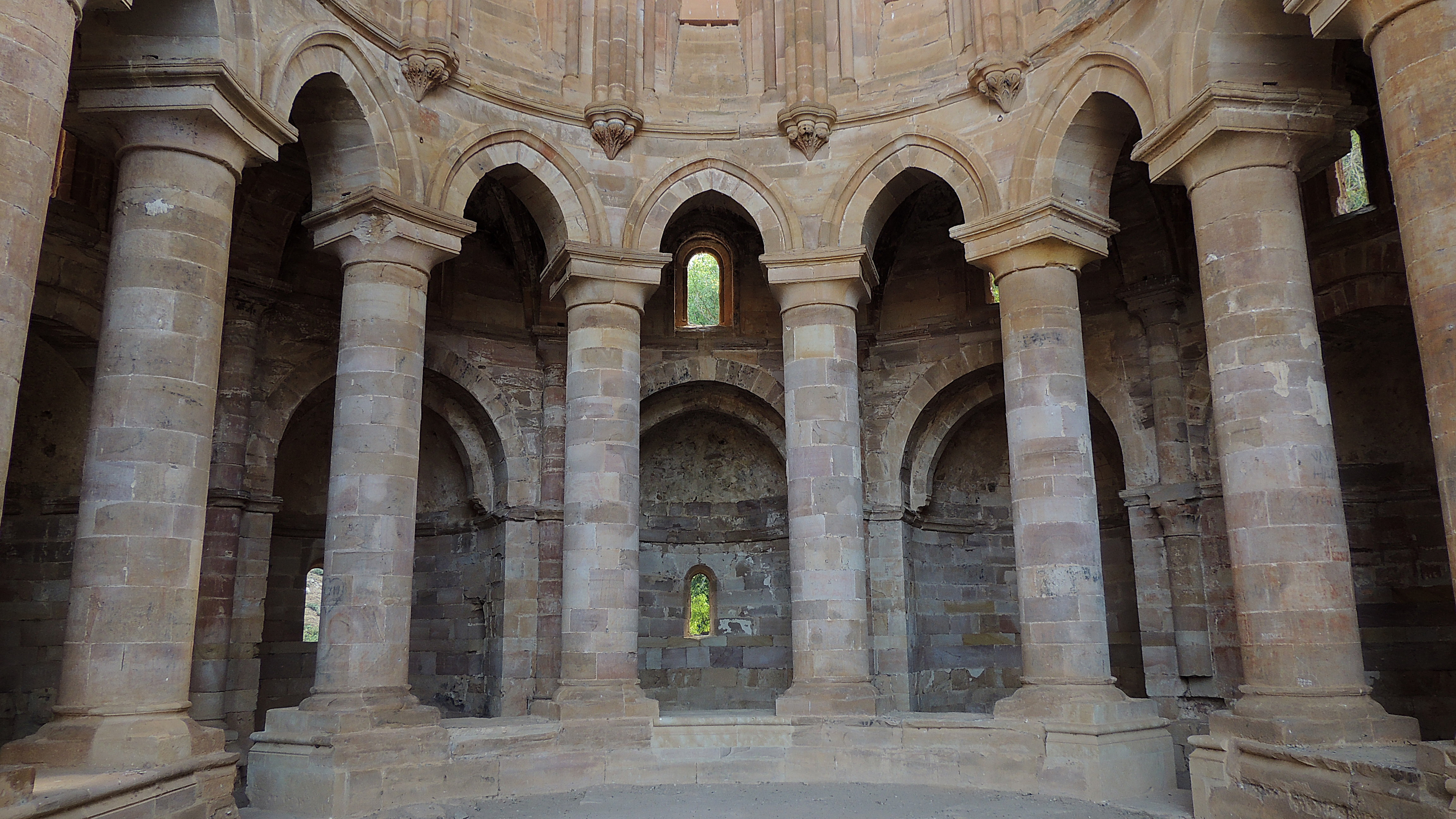 Girola de la iglesia del monasterio de Santa María de Moreruela